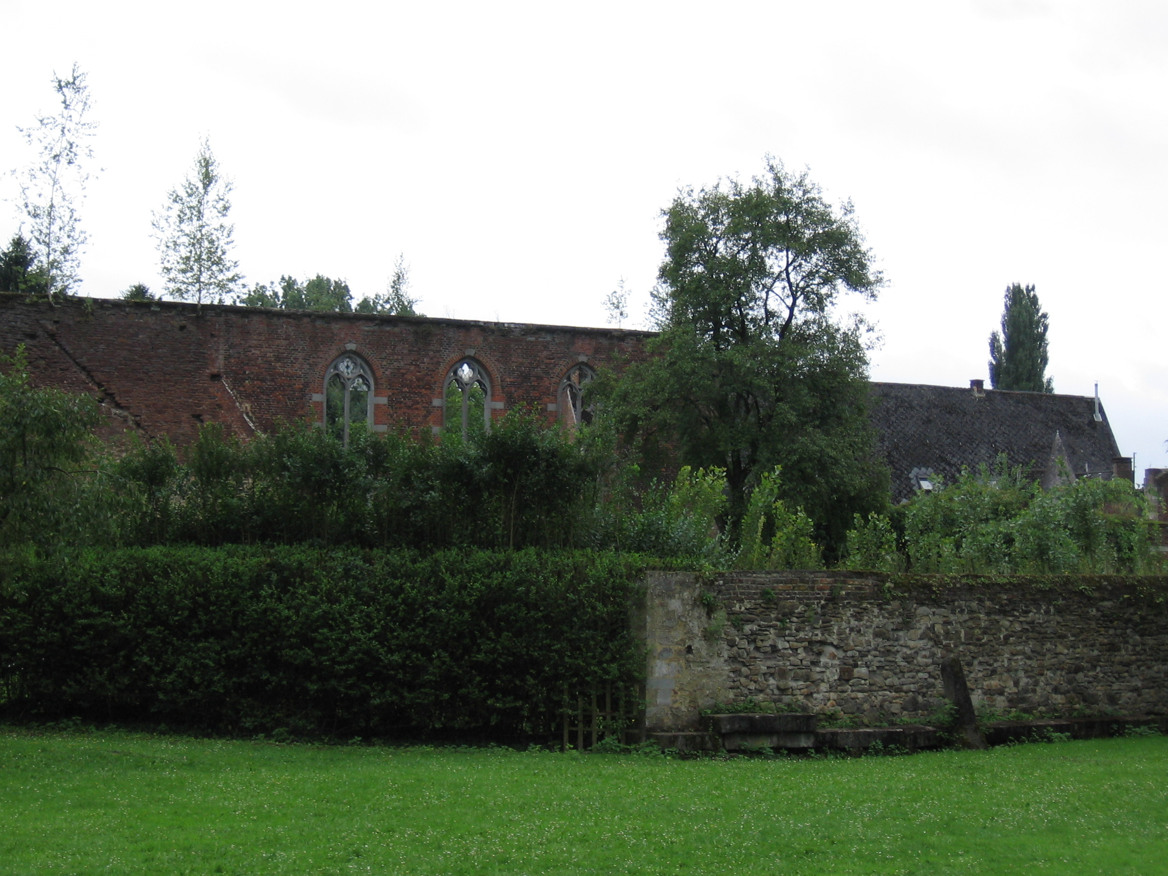 Ruines de l'église abbatiale de Soleilmont, détruite dans l'incendie de 1963.